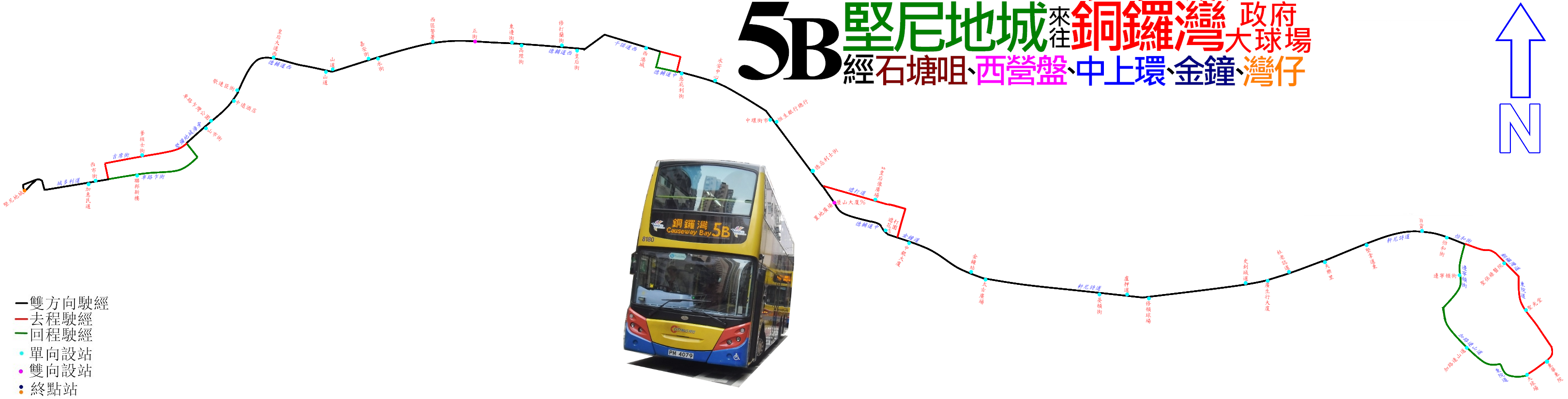 中文（香港）: 城巴5B線的走線圖